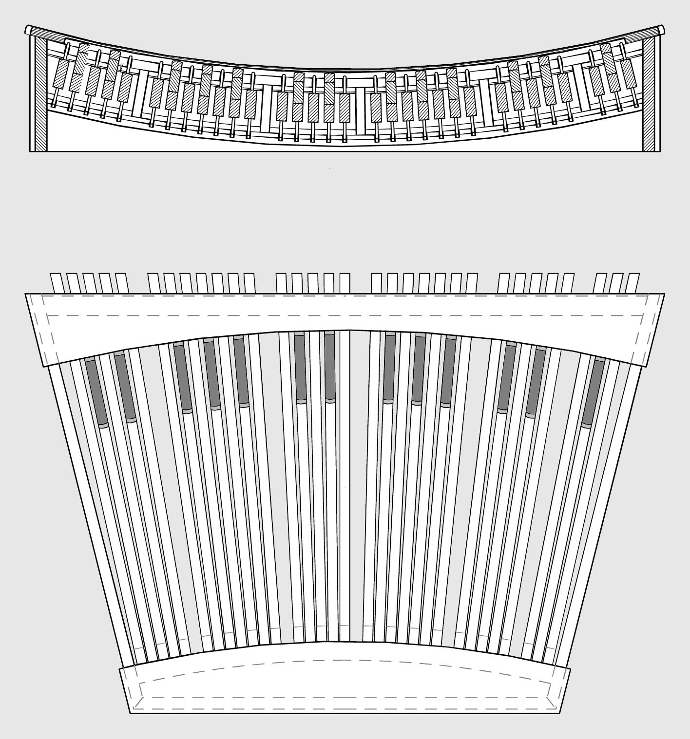 Schéma du pédalier AGO (American Guild of Organists) vu de devant et de dessus